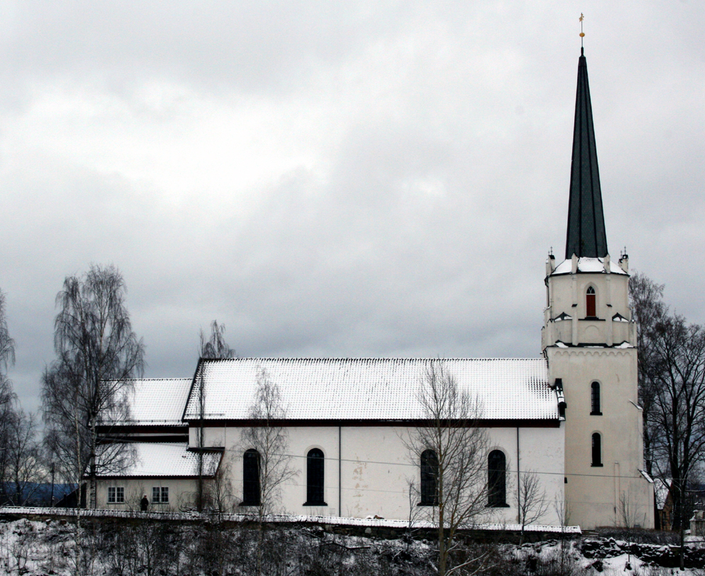 Løten church, Løten, Norway.